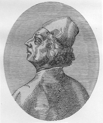 Demetrios Chalkondyles (1424–1511). Anonymer Stich.